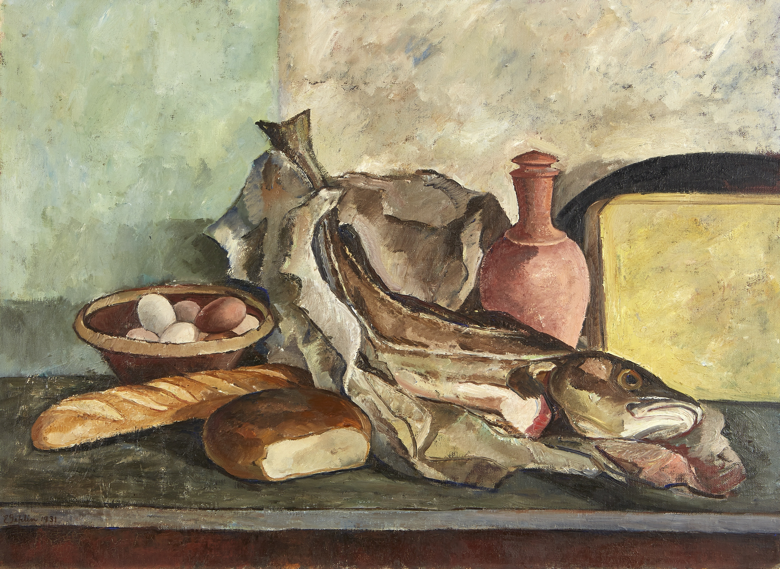 Stilleben med torsk och bröd, Esther Gehlin (1892–1949), 1931. Olja på duk, ca 74x94 cm